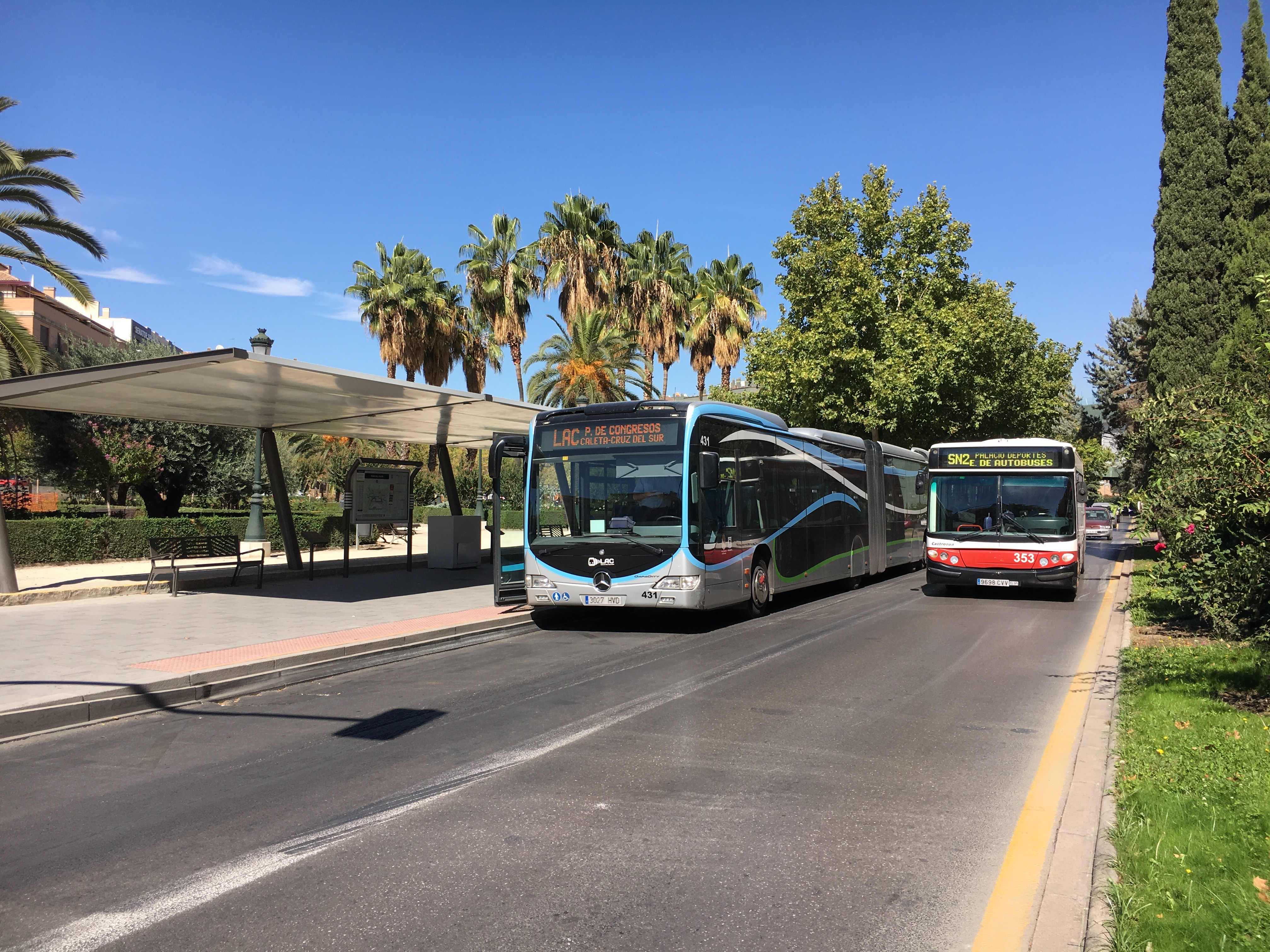 Intercambiador del Palacio de Congresos de la Línea de Alta Capacidad (LAC) de Granada (España)